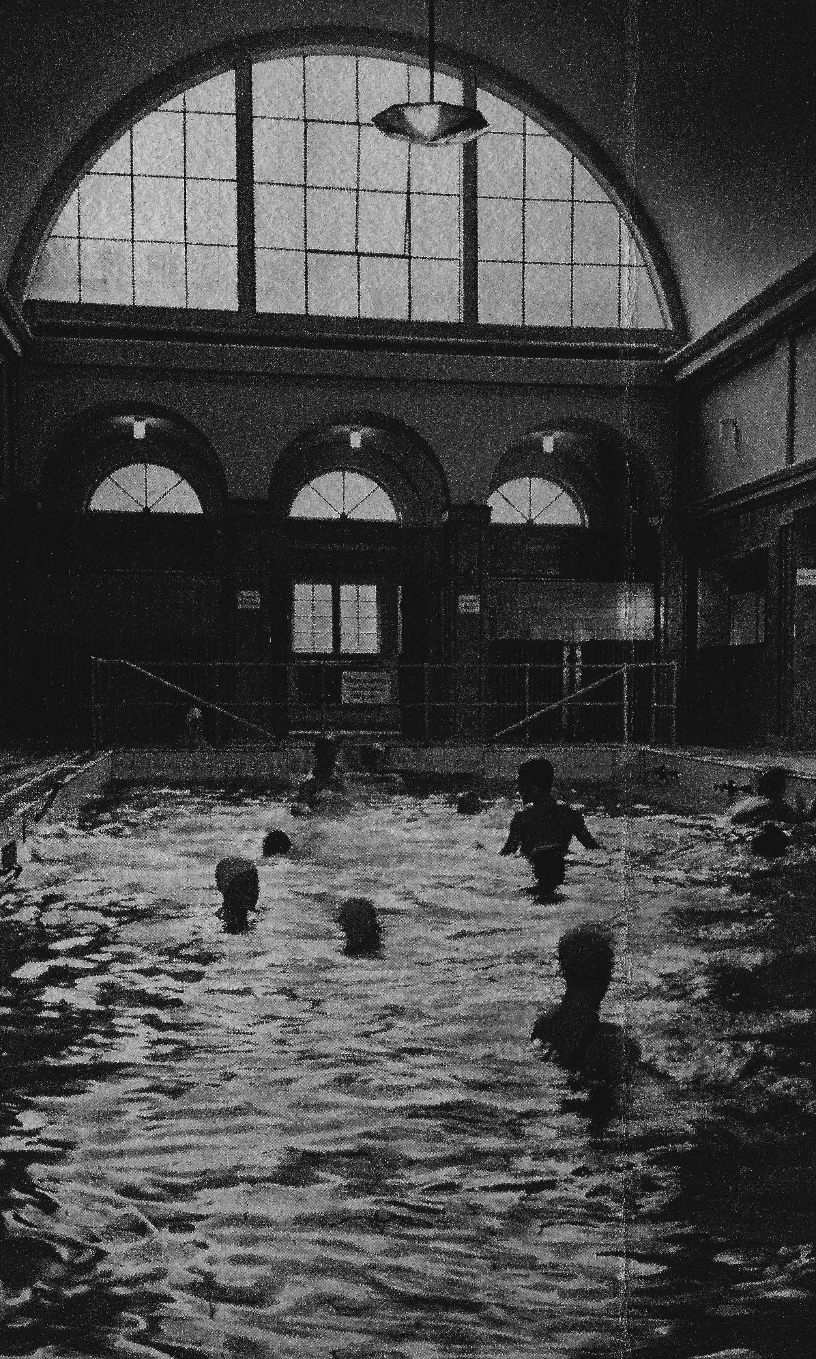 Das neueröffnete Thermalschwimmbad im Hotel Quellenhof, 1936